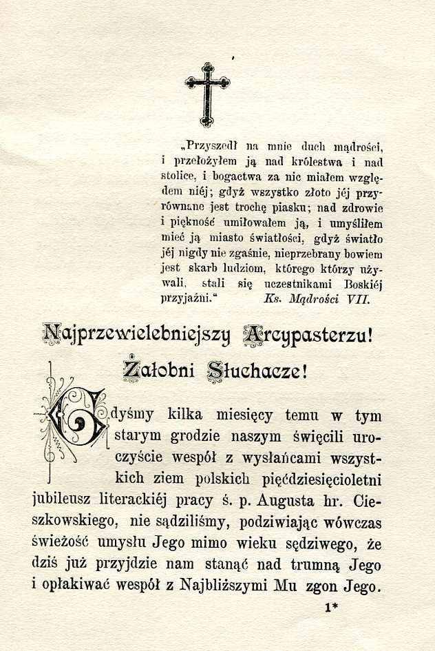 druk